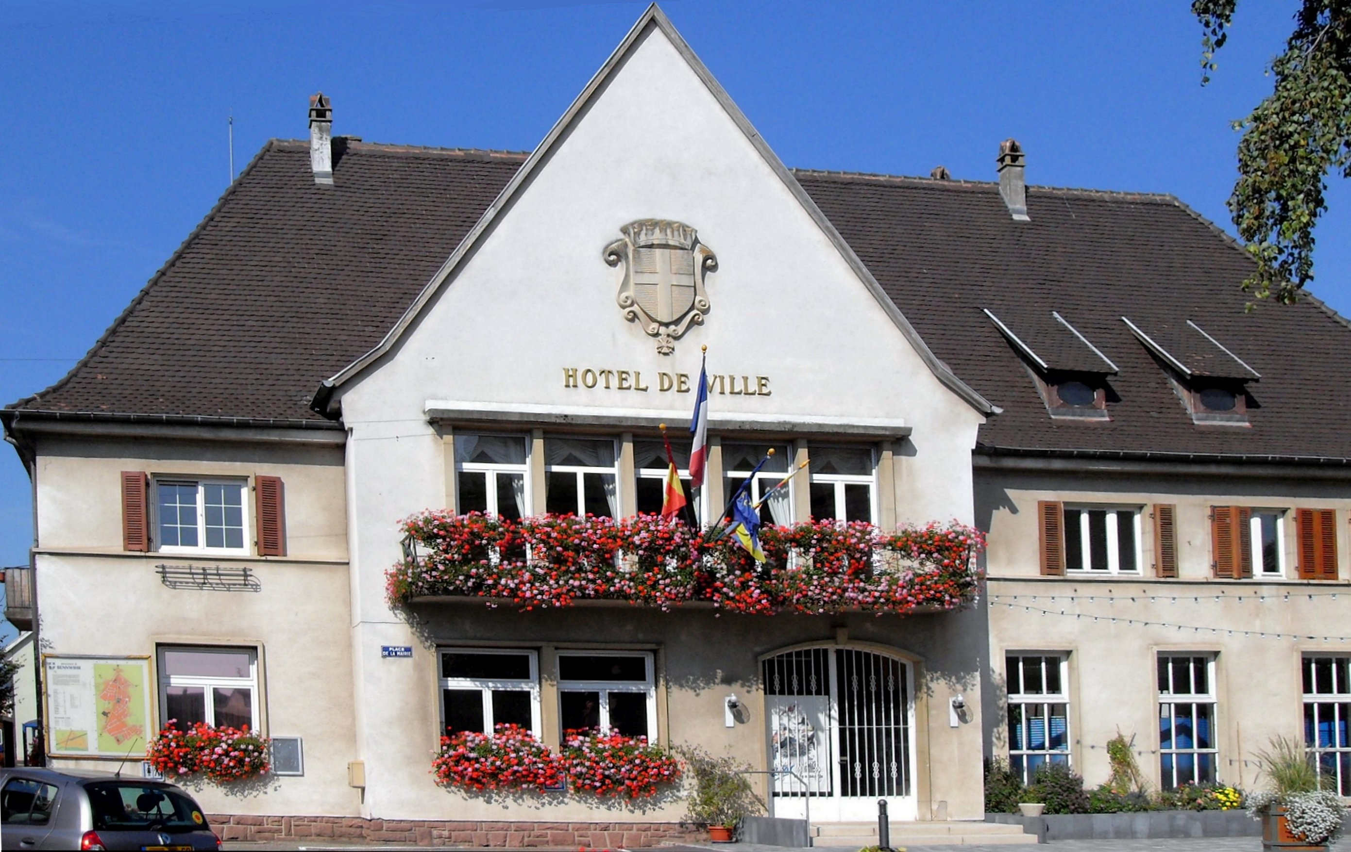 L'hôtel de ville de Bennwihr